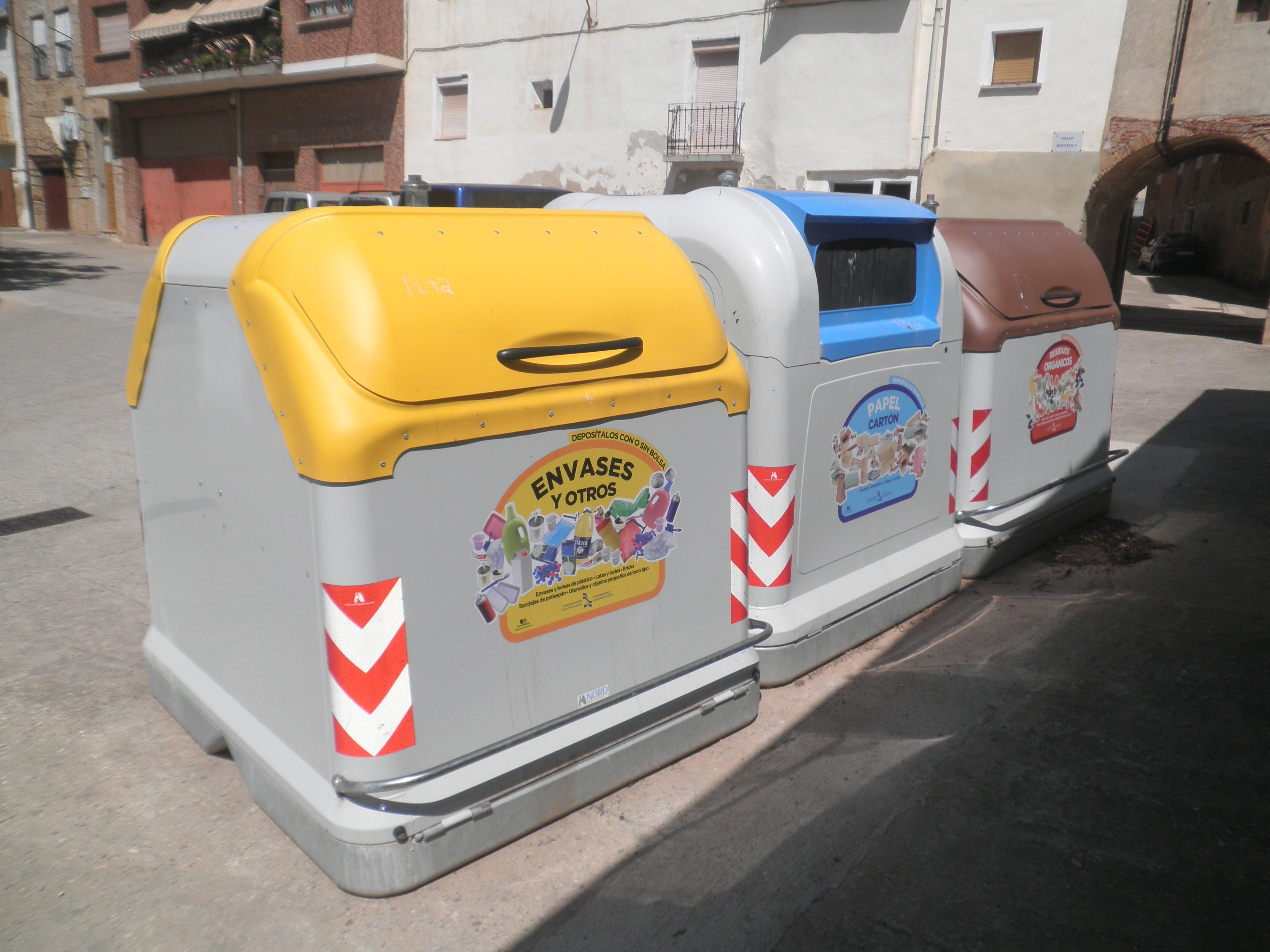 Mancomunidad de Montejurra contenedores Easy City